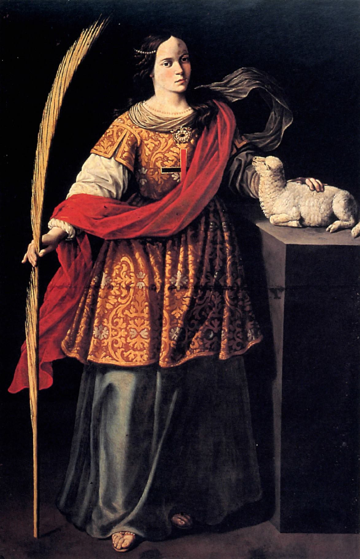 La obra representa a la mártir Santa Inés de Roma.